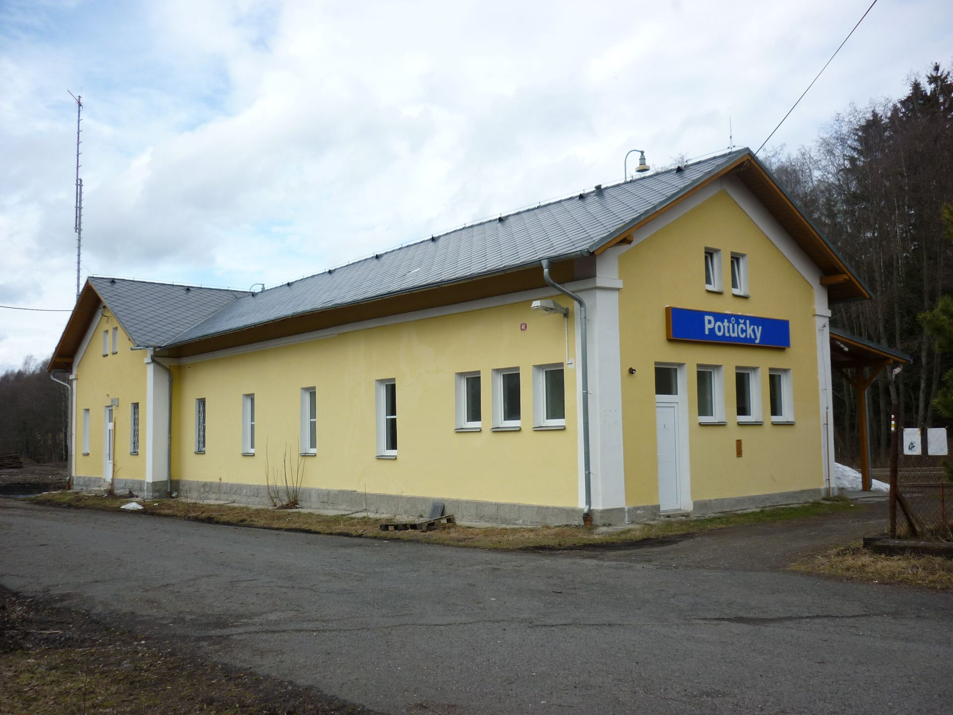 Nádraží ČD v Potůčkách